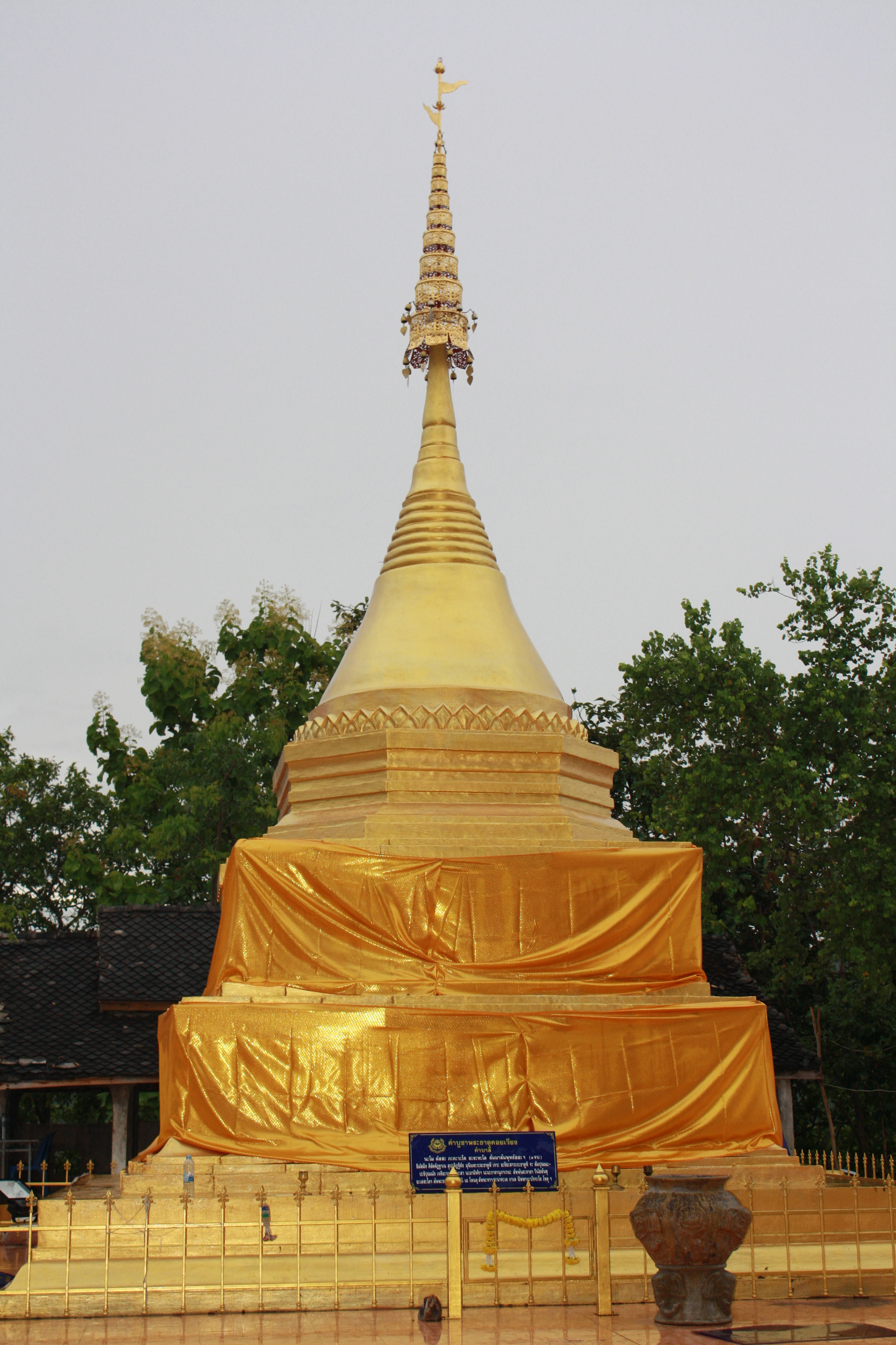 พระธาตุดอยเวียง อำเภอบ้านธิ จังหวัดลำพูน